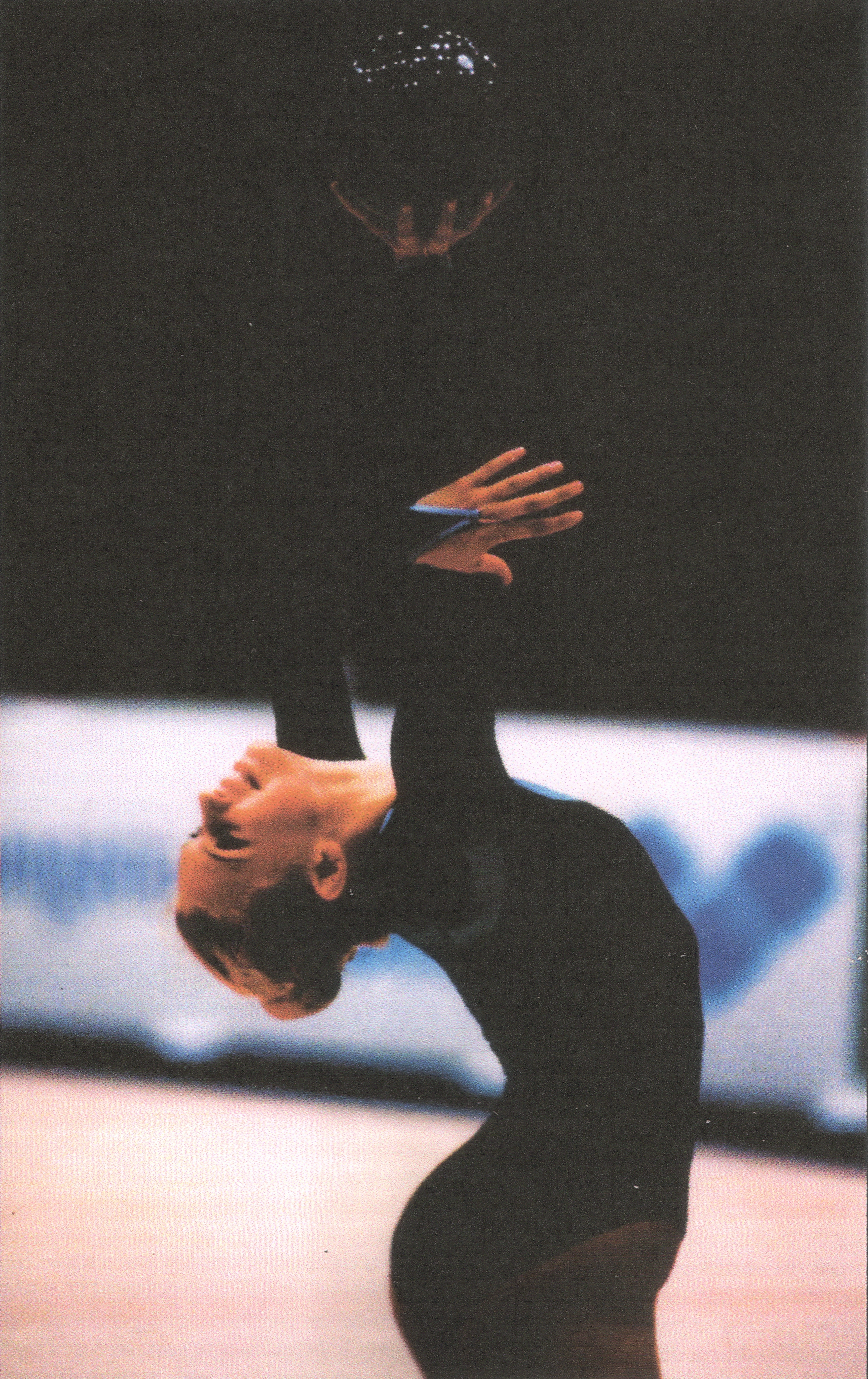 La gimnasta Magdalena Brzeska en el Mundial de Budapest en 1996.